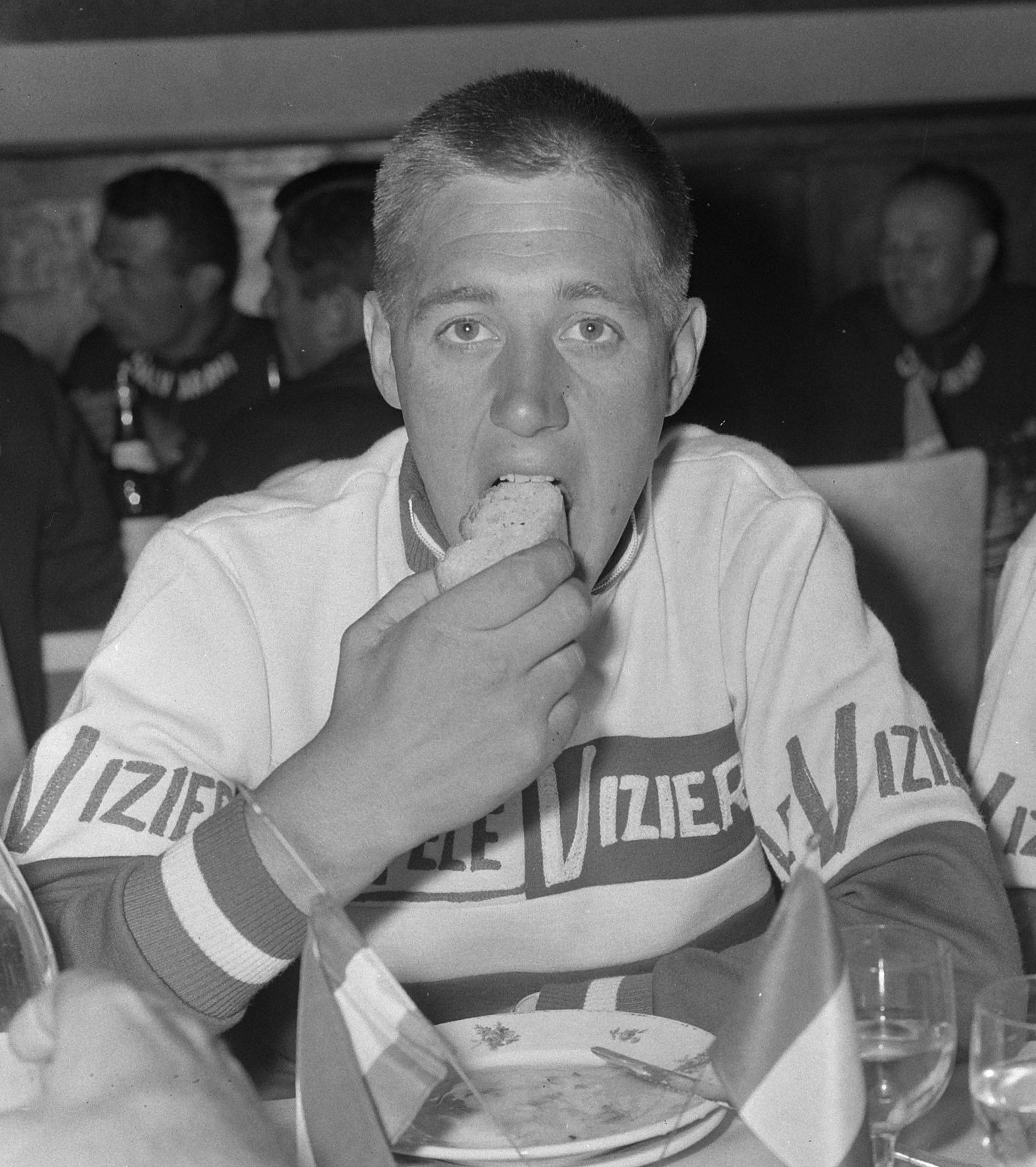 51ste Tour de France 1964, maaltijden Nederlandse ploeg. Cees van Espen